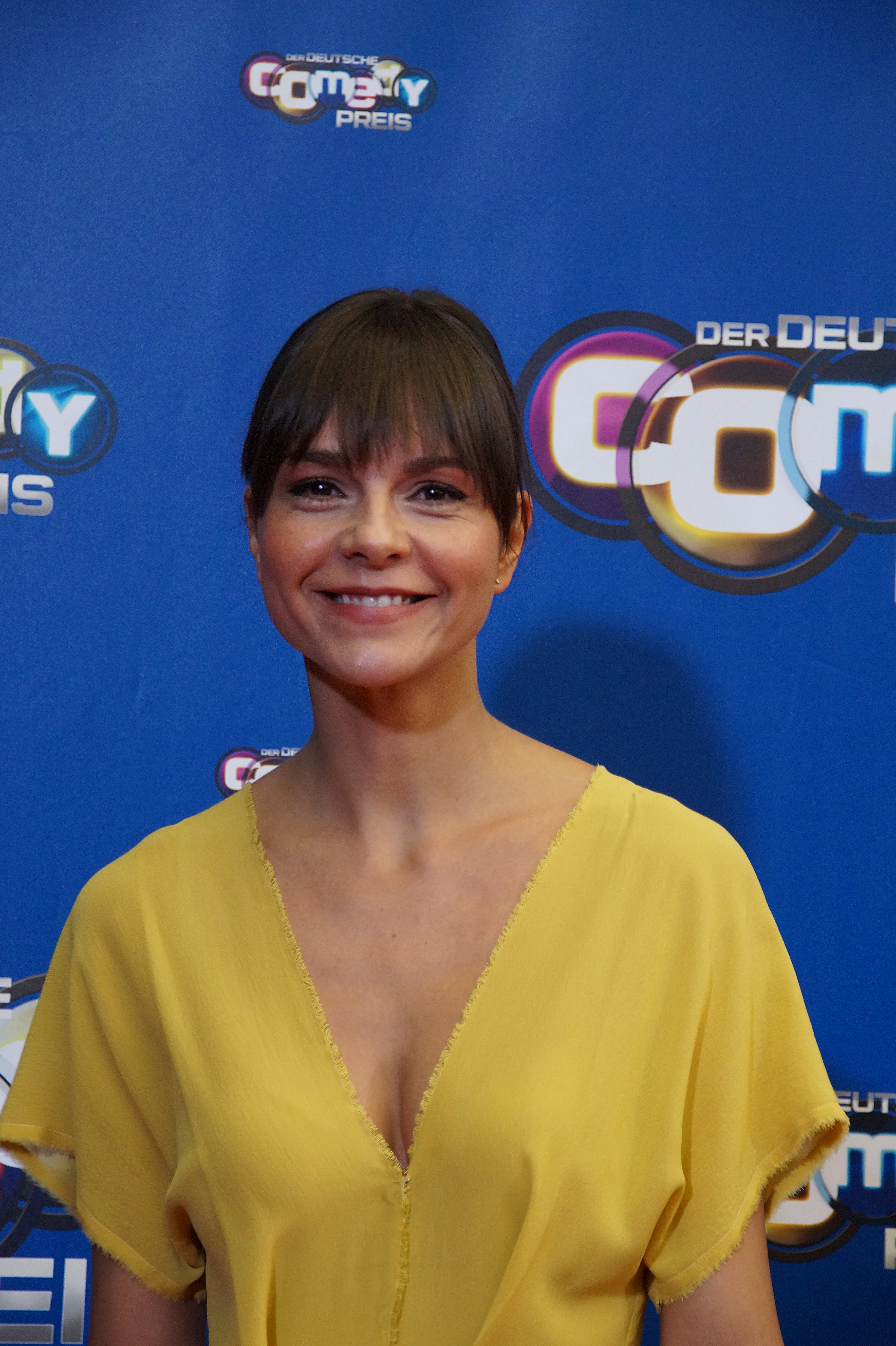 Susan Hoecke beim Comedypreis 2016, Oktober, Köln.